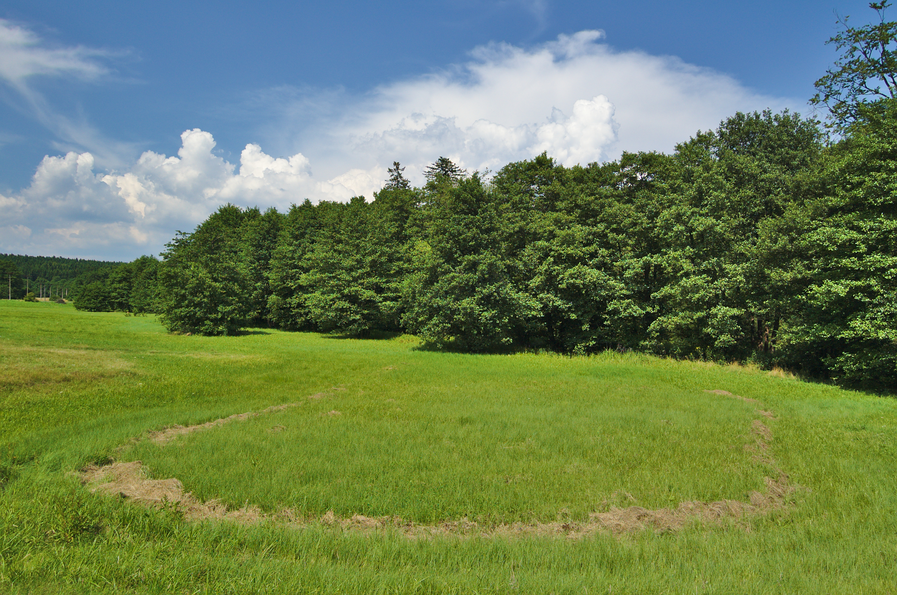 Přírodní rezervace Skelná Huť, Protivanov, okres Prostějov